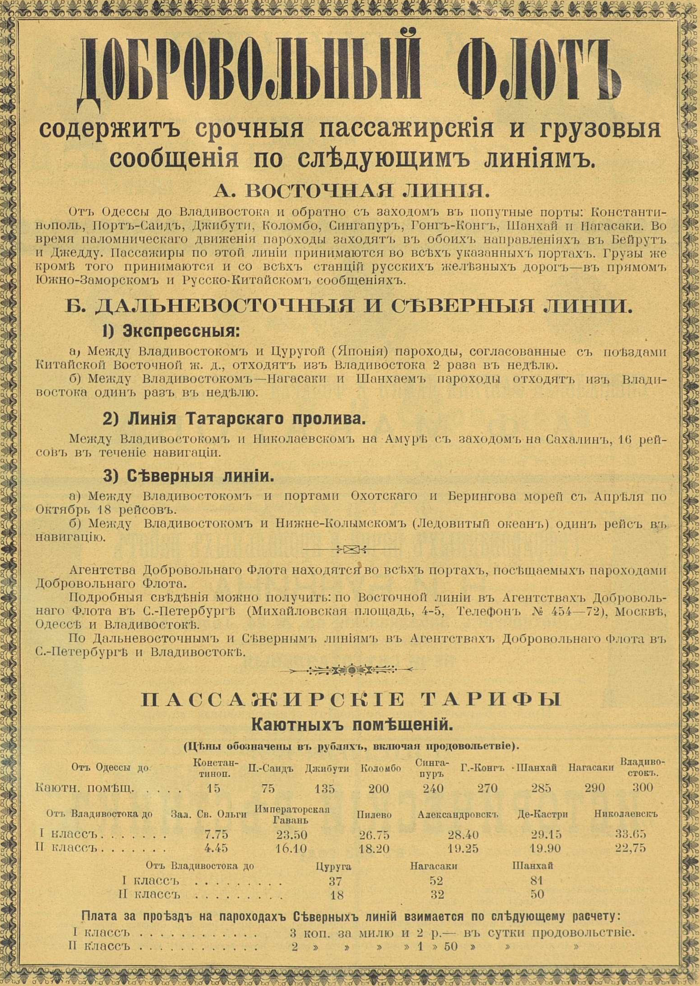 Реклама Добровольного флота, 1913 год.